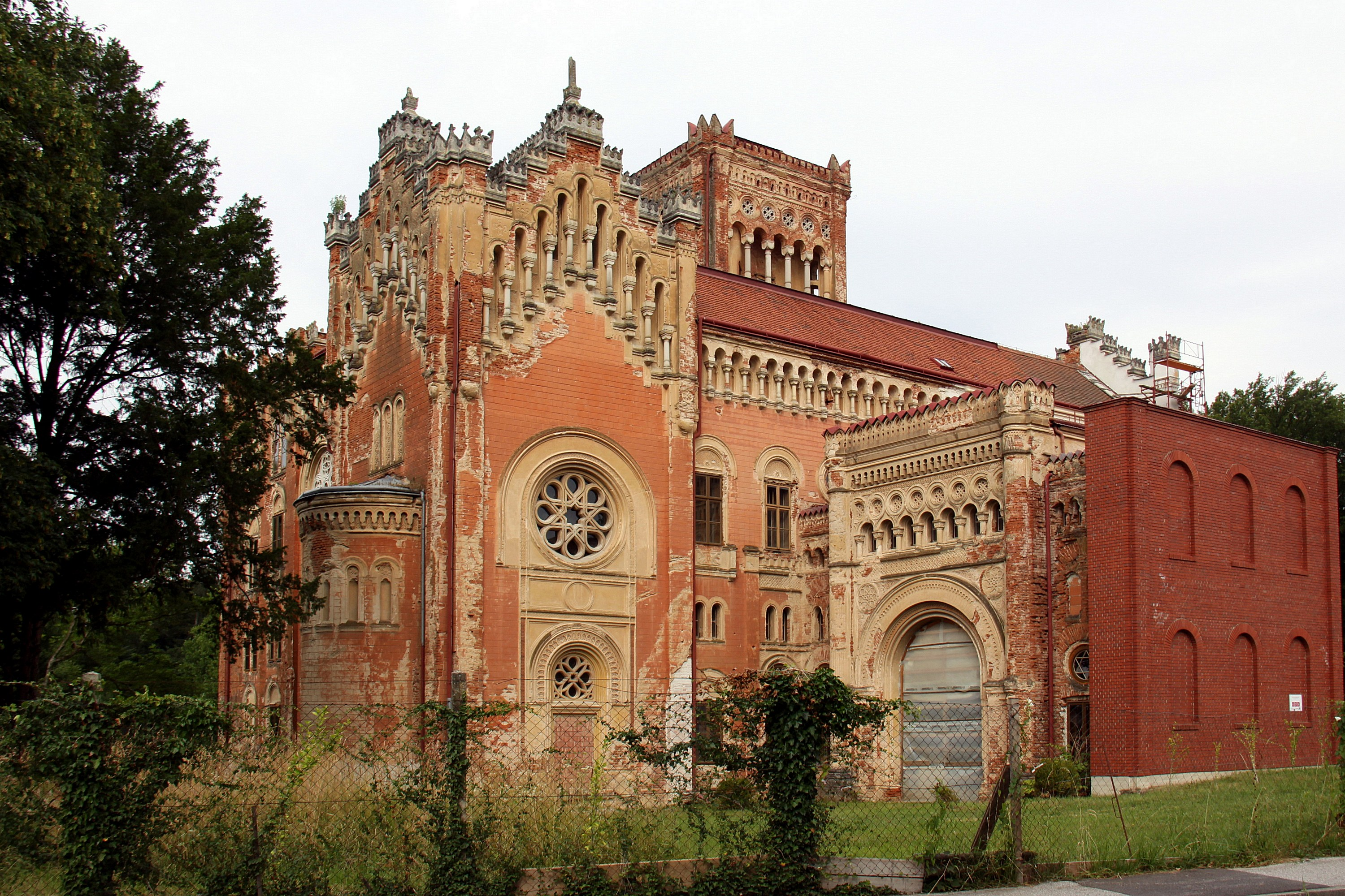 Denkmalgeschütztes Neues Schloss in Rotenturm an der Pinka - OpenStreetMap(Info)